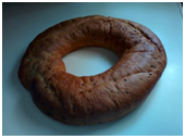 Rosco de caridad Colligués